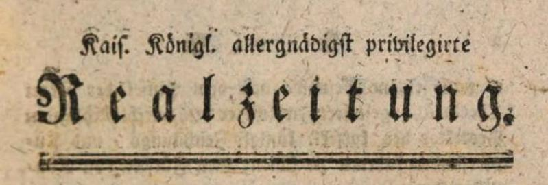 Titelblatt der Wiener Realzeitung (1772)